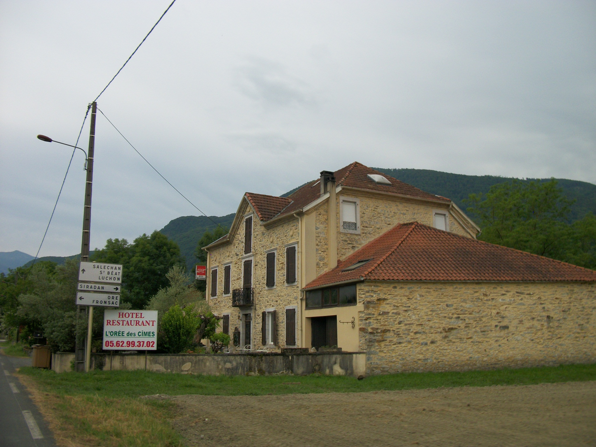 Hôtel Restaurant l'Orée des Cimes